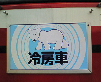 南部バスが1980年代中頃に最初の冷房車両が投入されたときから提示されていた『冷房車』であることを示すサインボード